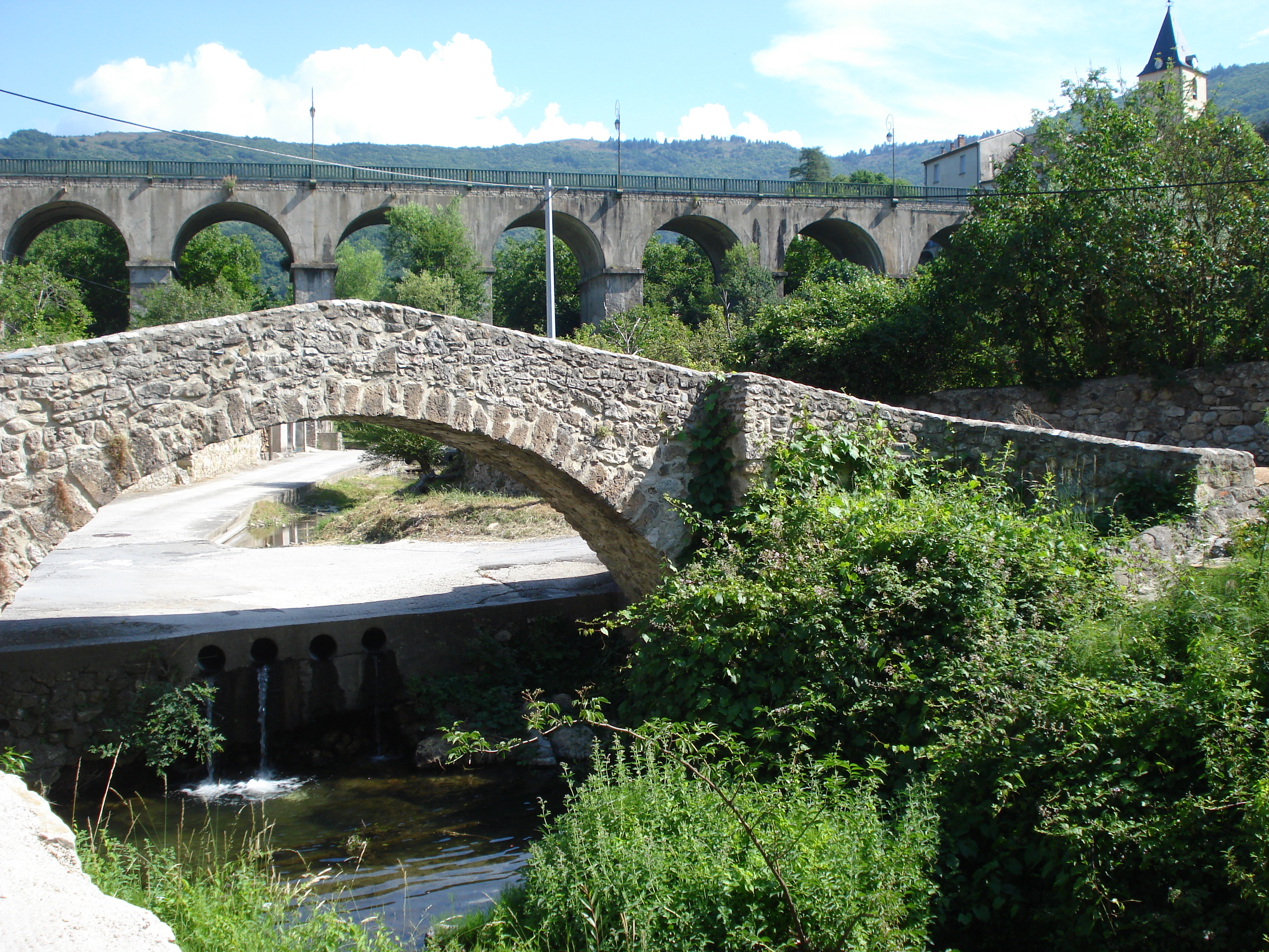 Bez (Bez-et-Esparon), le Merlanson avec ses 2 ponts. Le Merlansdson débouche un peu plus loin dans l'Arre.